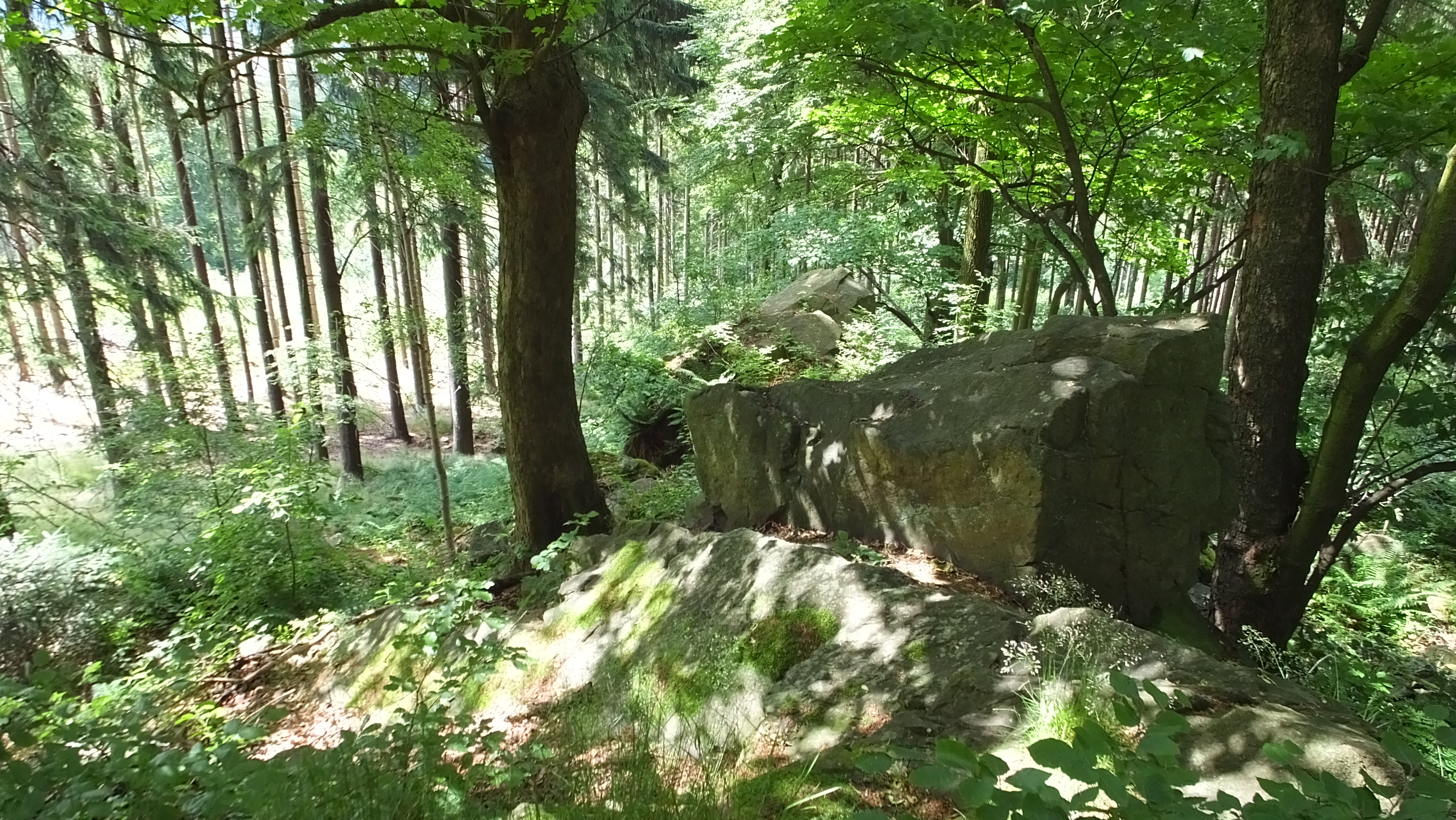 Felsblöcke auf dem Gipfel des Jüttelsberges